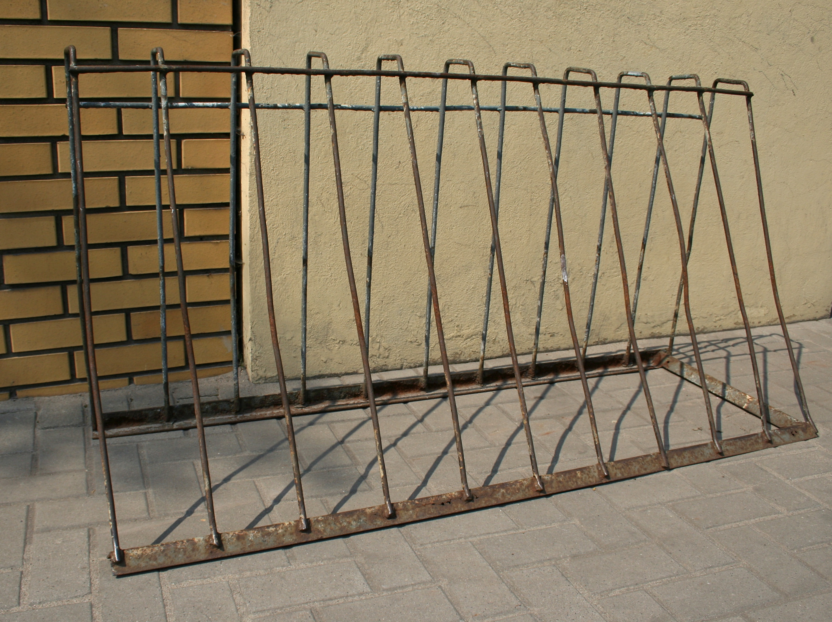 Stojak na rowery przy kościele św. Katarzyny w Miedźnie, woj. śląskie